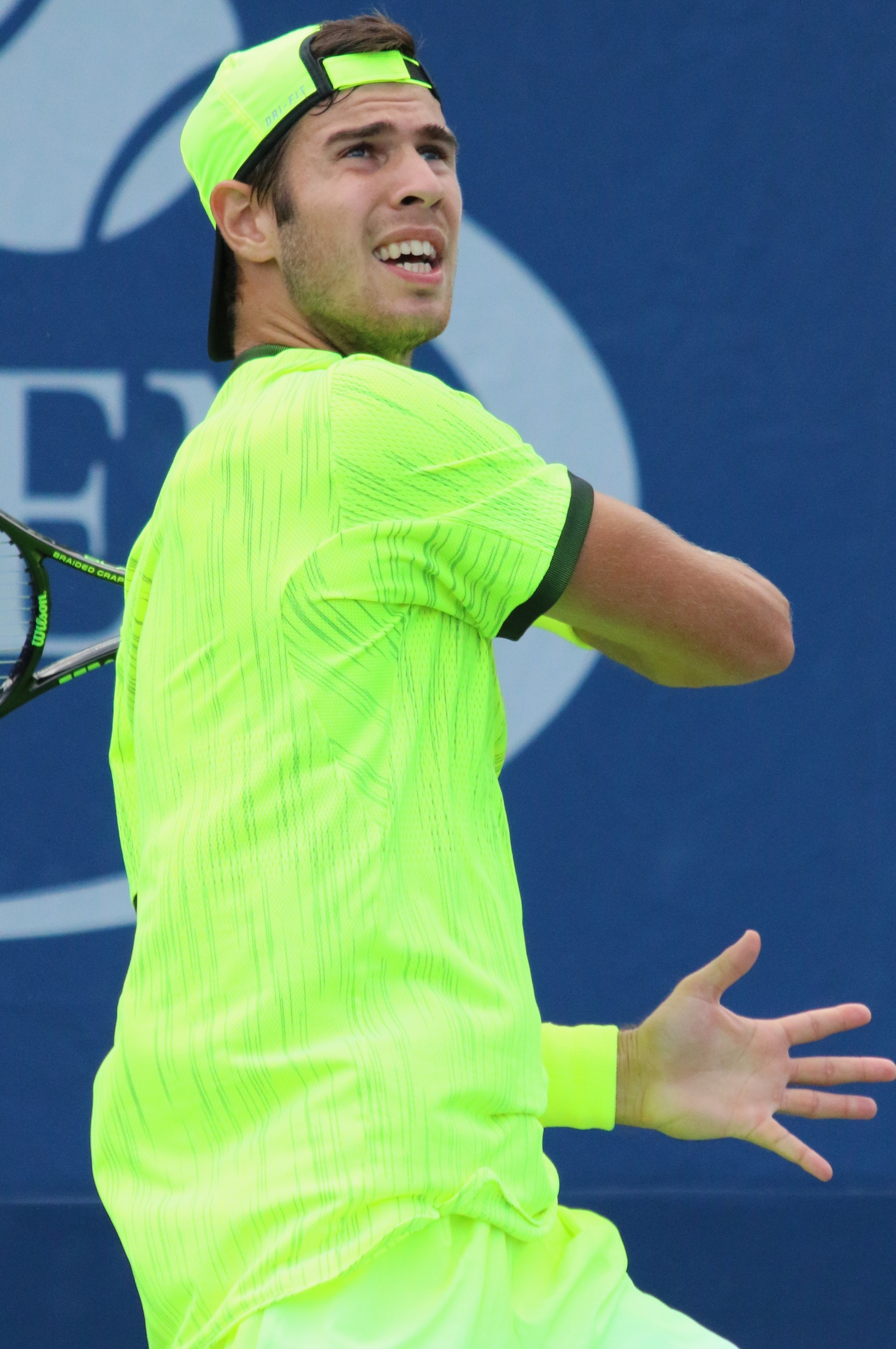 Khachanov US16 (6)